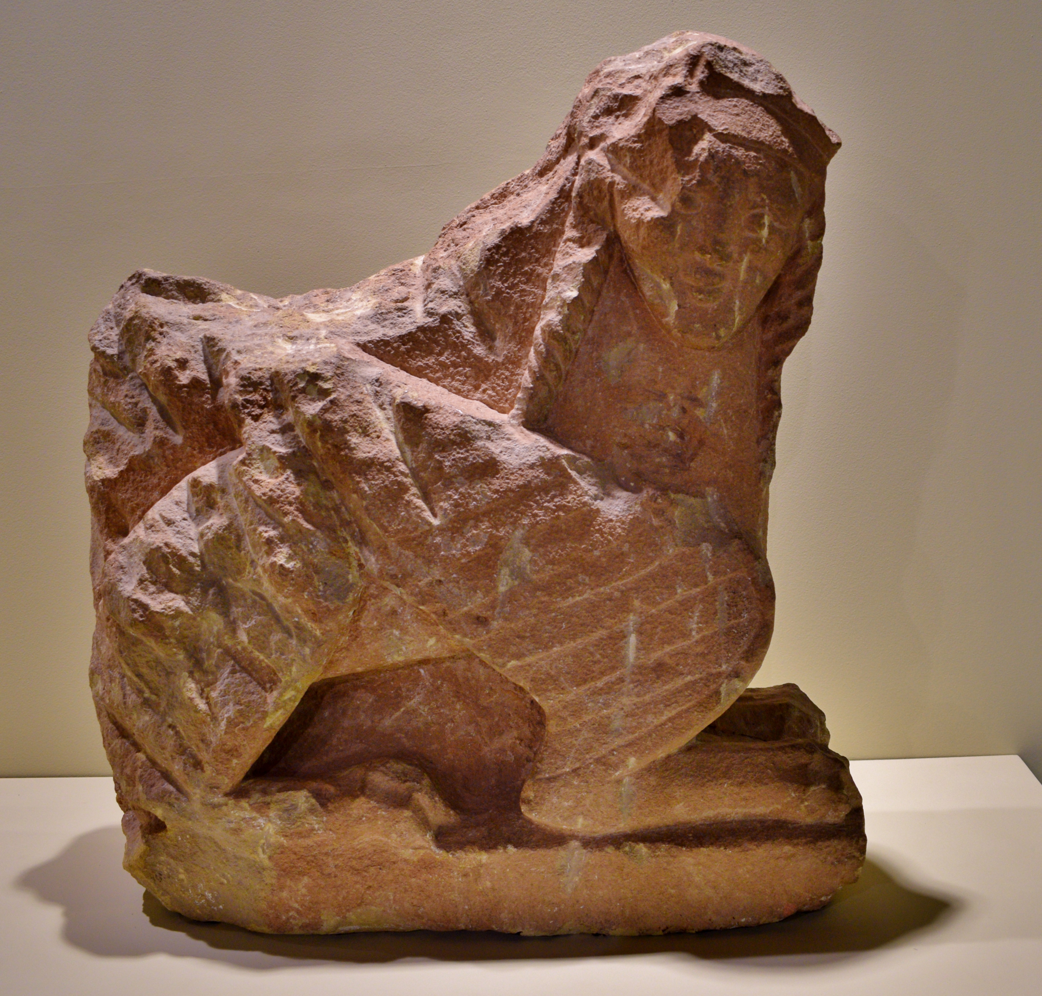 Museo de Albacete. Esfinge (s. V a.C.)Proveniente de Haches (Bogarra).Piedra arenisca.